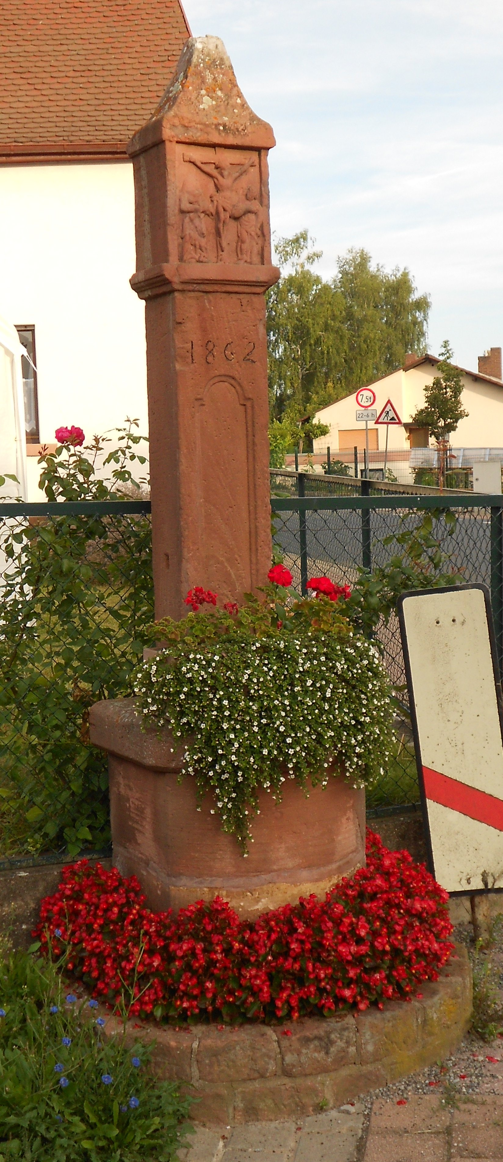 Bildstock, bei Odenwaldstraße 27, Wörth am Main um 1600, bez. 1862, AktenNr. D-6-76-169-19